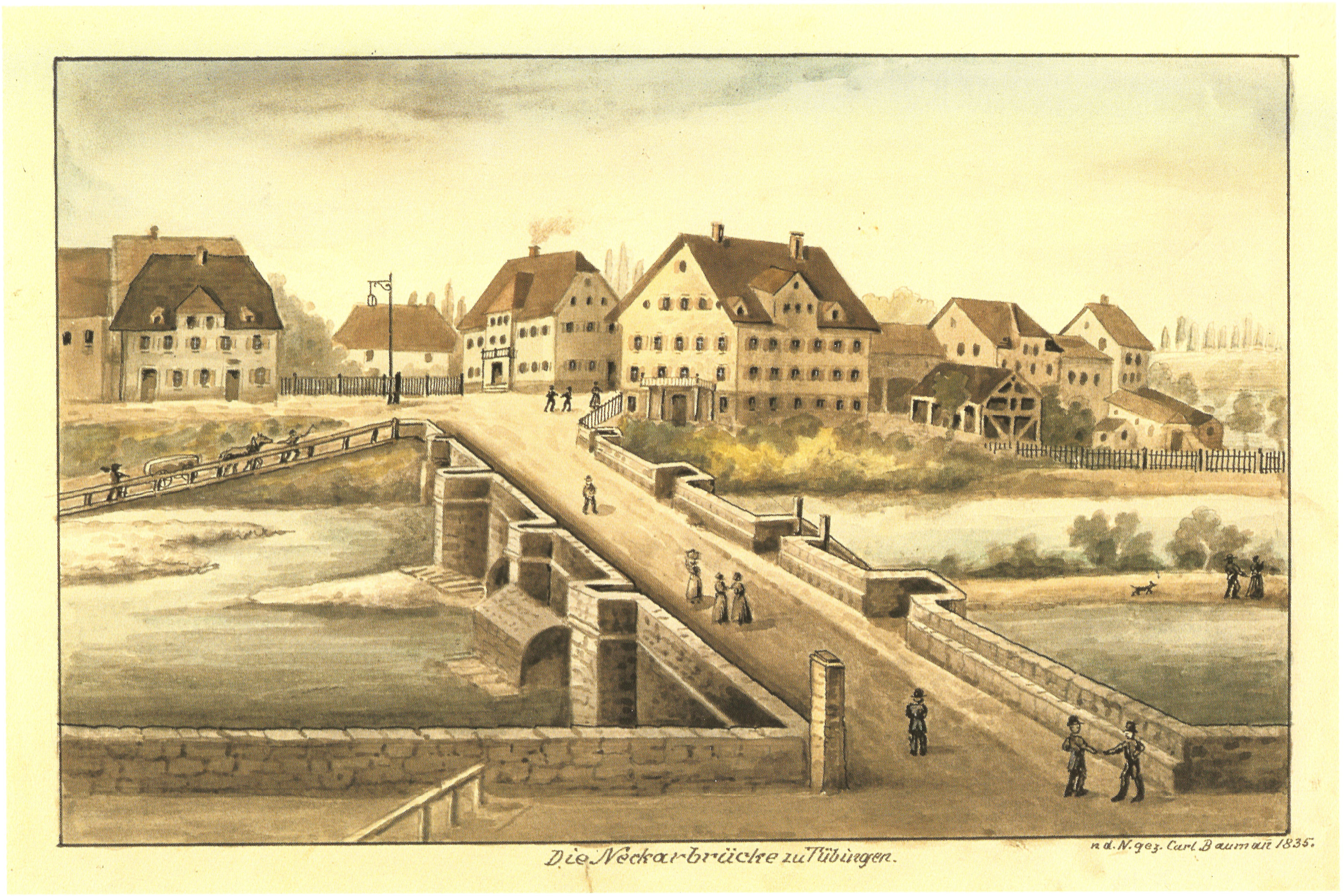 "Die Neckarbrücke zu Tübingen" (Tusche und Farbe auf Papier, 21,5 x 32cm)